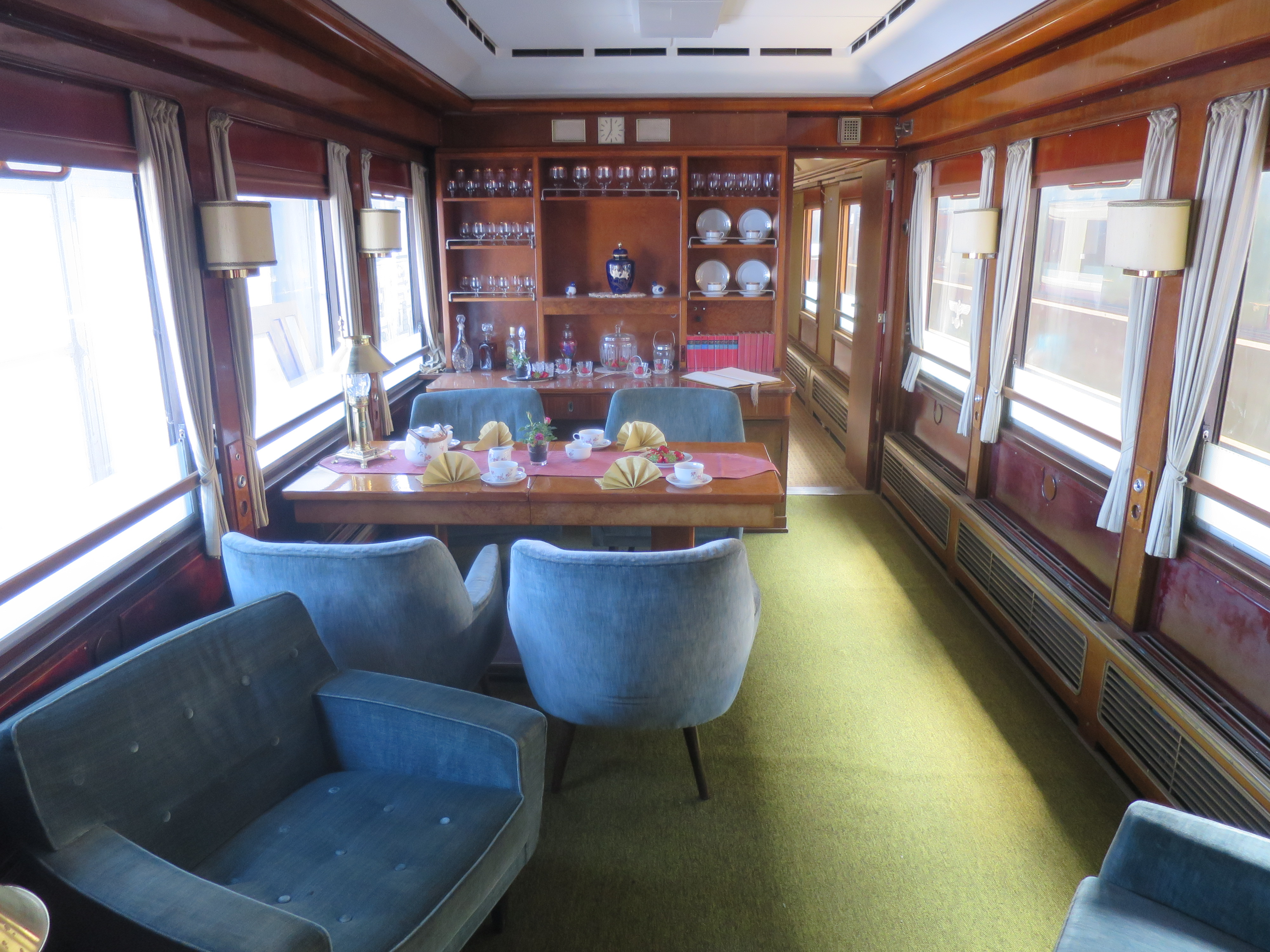 Salonwagen v. Joseph Goebbels, später der des Bundesverkehrsministers